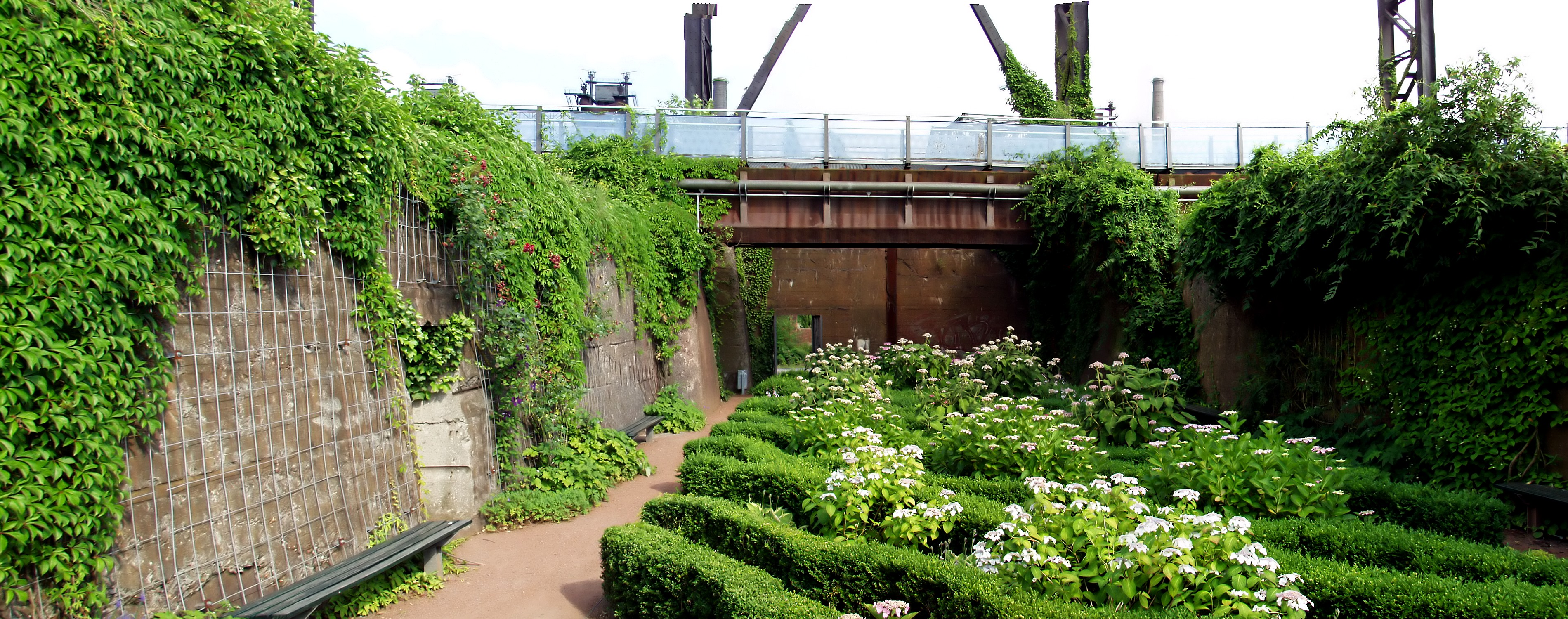 Landschaftspark Duisburg-Nord - Garten im Bunker